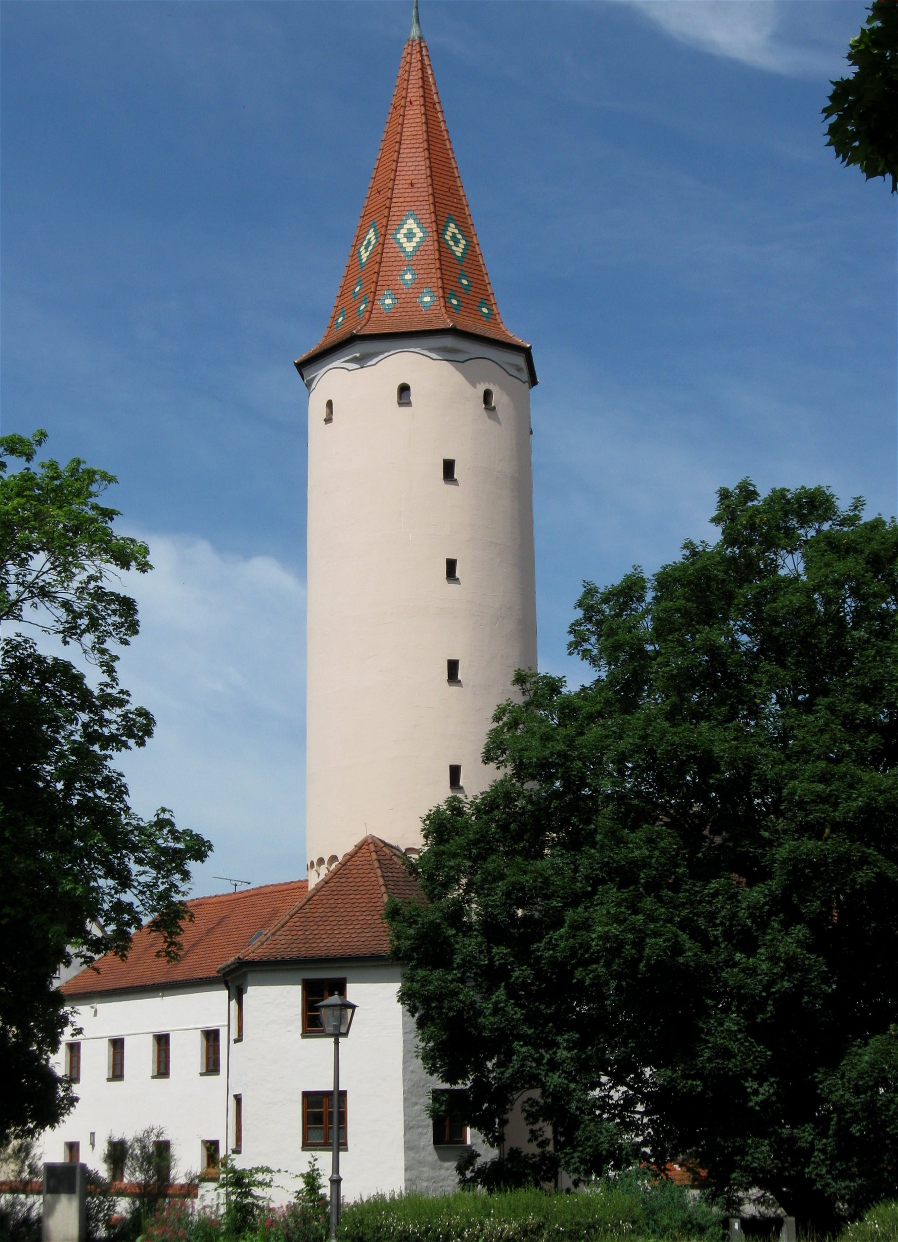 Imhofgasse 3; Hungerturm, fünfgeschossiger, zylindrischer Backsteinbau mit Spitzhelm, im Südosten, Unterbau wohl 2. Hälfte 14. Jh., Obergeschosse Ende 15./Anfang 16. Jh. Teil der ehem. Stadtbefestigung. D-7-78-173-1